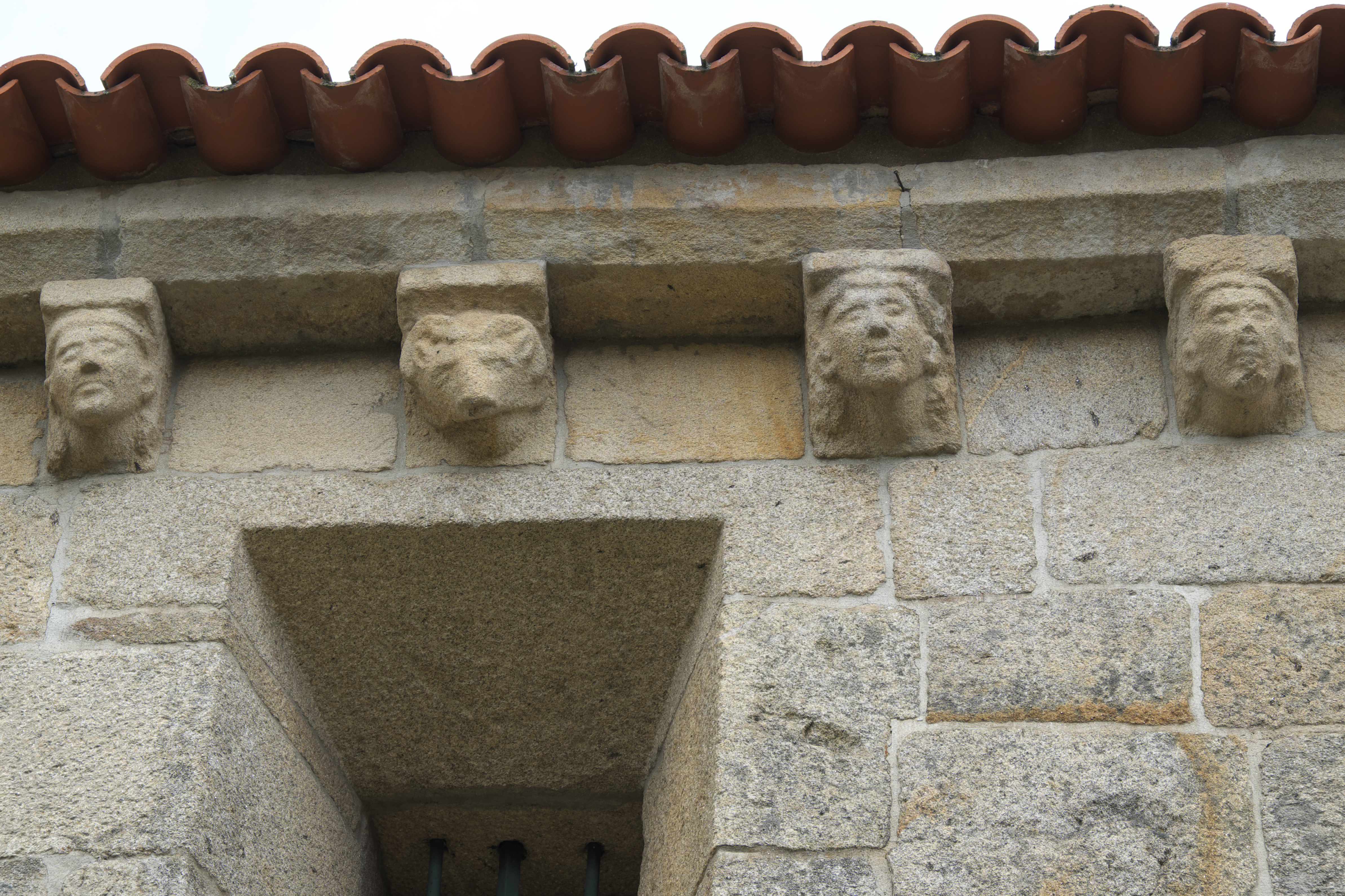 Romanische Kirche Nossa Senhora da Azinheira in Outeiro Seco, einer Freguesia von Chaves in der Região Norte (Portugal), Kragsteine